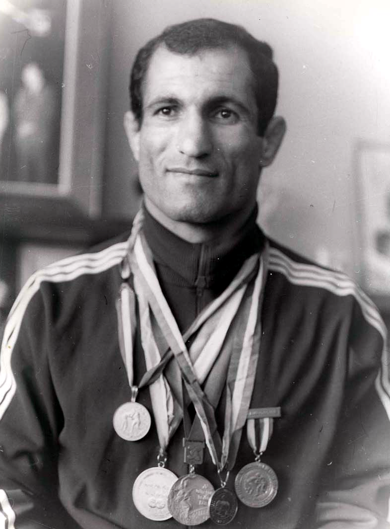 Abdollah Movahed, Iranischer Freistilringer